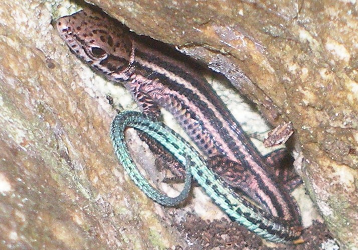 Tropidosaura gularis